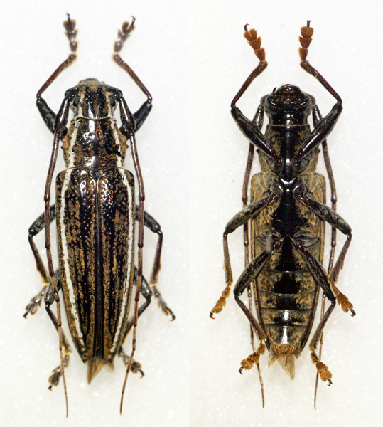 Newman,1842 Sex: Male Data: 11-2013 - Male - Kalinga - North Luzon - Philippines Size: ?